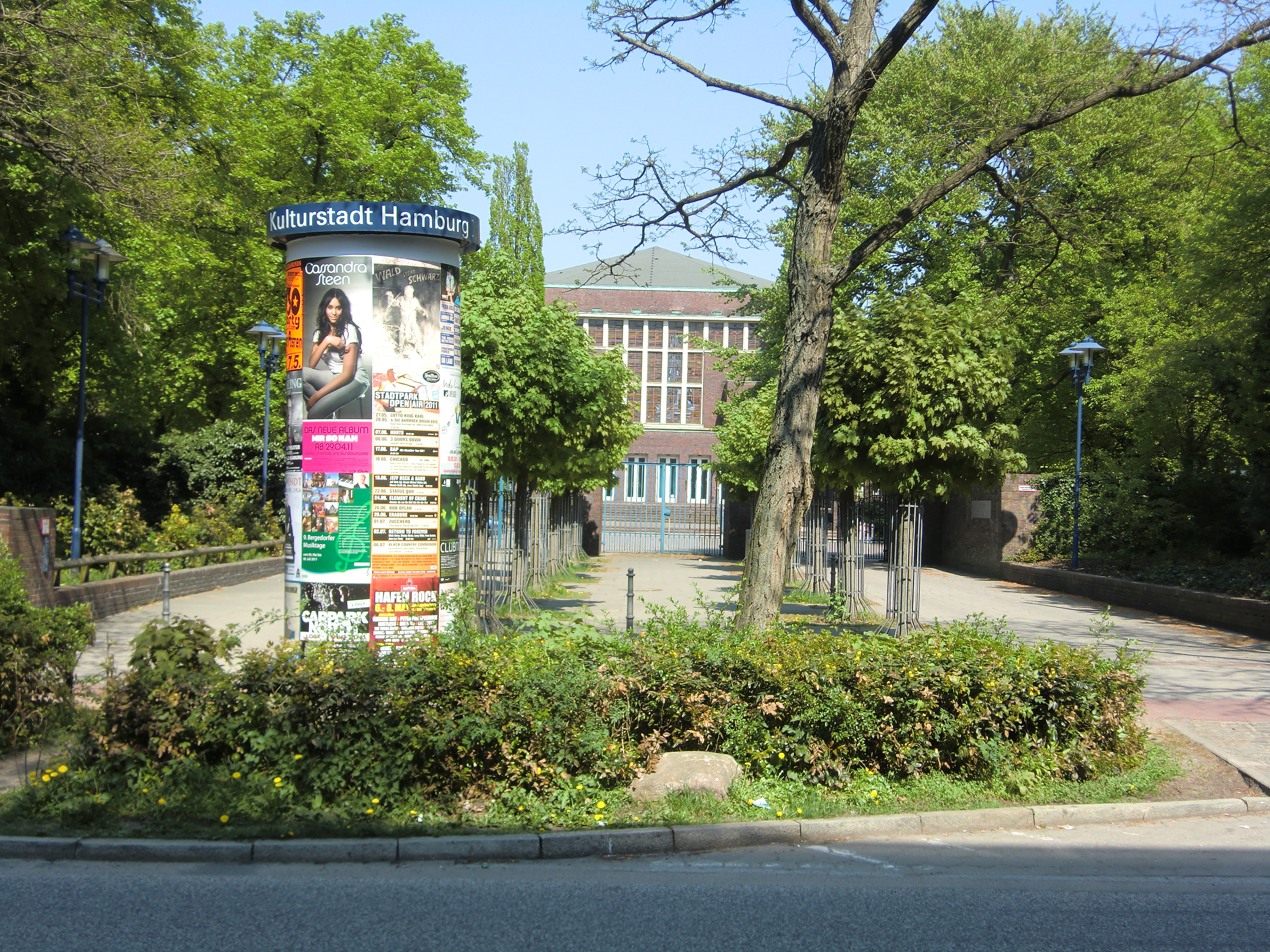 Friedrich Ebert Halle (Aula des Gymnasiums), Alter Postweg 30, Hamburg-Harburg. Am 22. und 23.06.1961 wurden 8 Stücke mit Tony Sheridan, begleiet von den Beat Brothers (Beatles) aufgenommen: Why, Nobody's Child, Sweet Georgia Brown, If You Love Me, Baby, Ain't She Sweet (Gesang John Lennon), Cry For A Shadow (instrumental), My Bonnie und When The Saints als Single. Produzent: Bert Kaempfert, Toningenieur: Karl Hinze. Hier wurden wegen der sehr guten Akustik ein großer Teil der Star-Club Aufnahmen eingespielt. Aufnahmen mit Tony Sheridan vocal, John Lennon vocal & rhythm guitar, Paul McCartney bass, George Harrison lead guitar, Pete Best drums, Bernard Purdie drum overdubs.